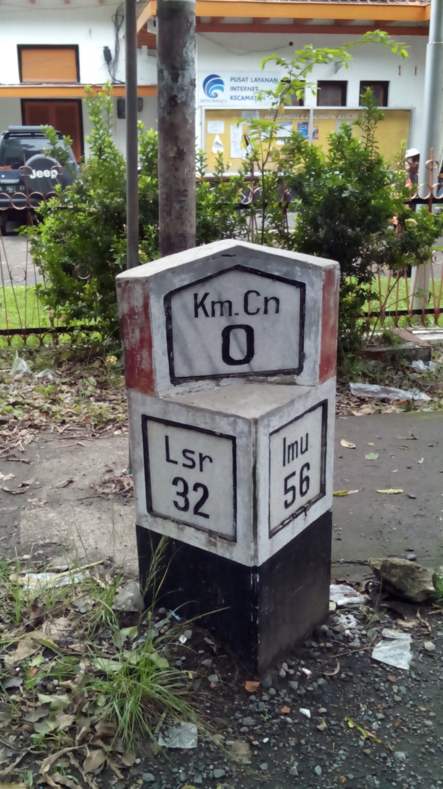 Nol kilometer Kota Cirebon